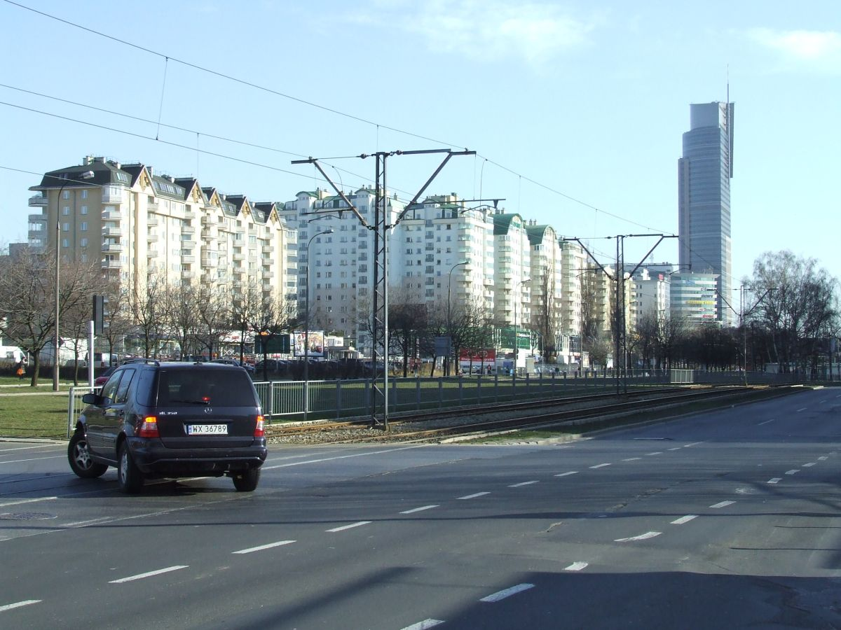 Okopowa Street in Warsaw